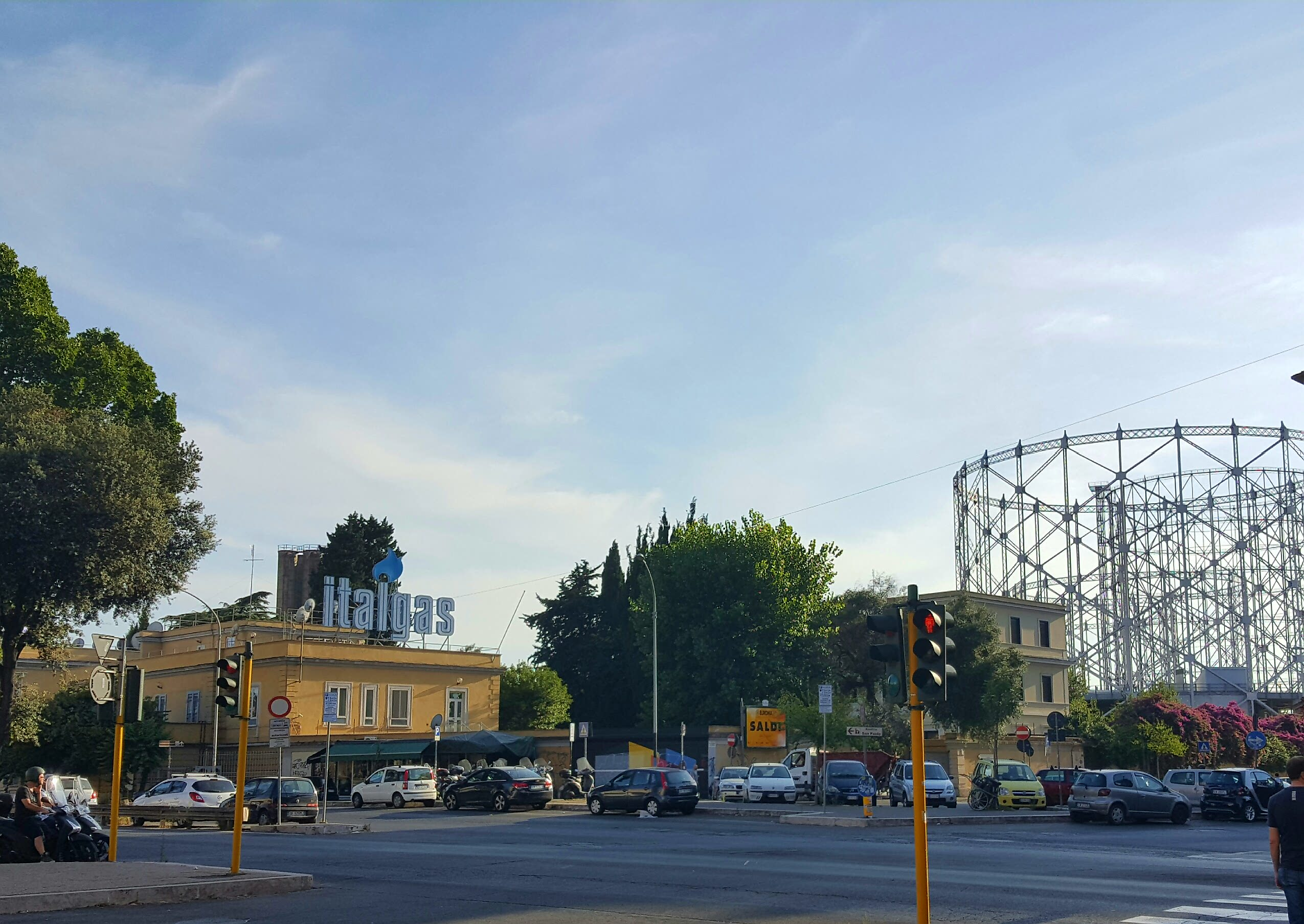 Sede Italgas a Roma, via del commercio, 9